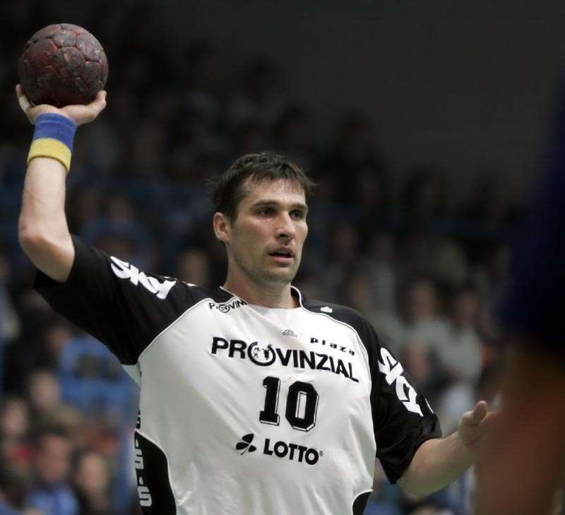 Stefan Lövgren, on December 30th 2006 in Aschaffenburg (Germany), during the game TV Grosswallstadt - THW Kiel (25:30)